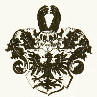 Wappen der von Raschau des Stammes der Vögte von Straßberg und der von Vogtsberg; stammverwandt mit den von Milin und den von Kottenplan